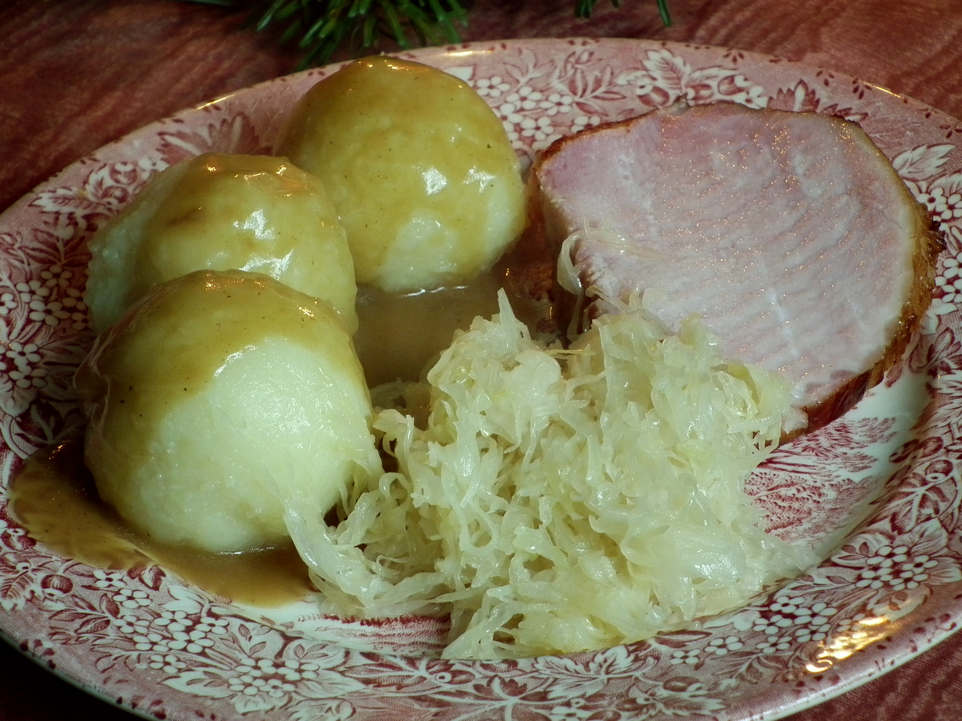 Stück Kassler mit Sauerkraut und Knödeln